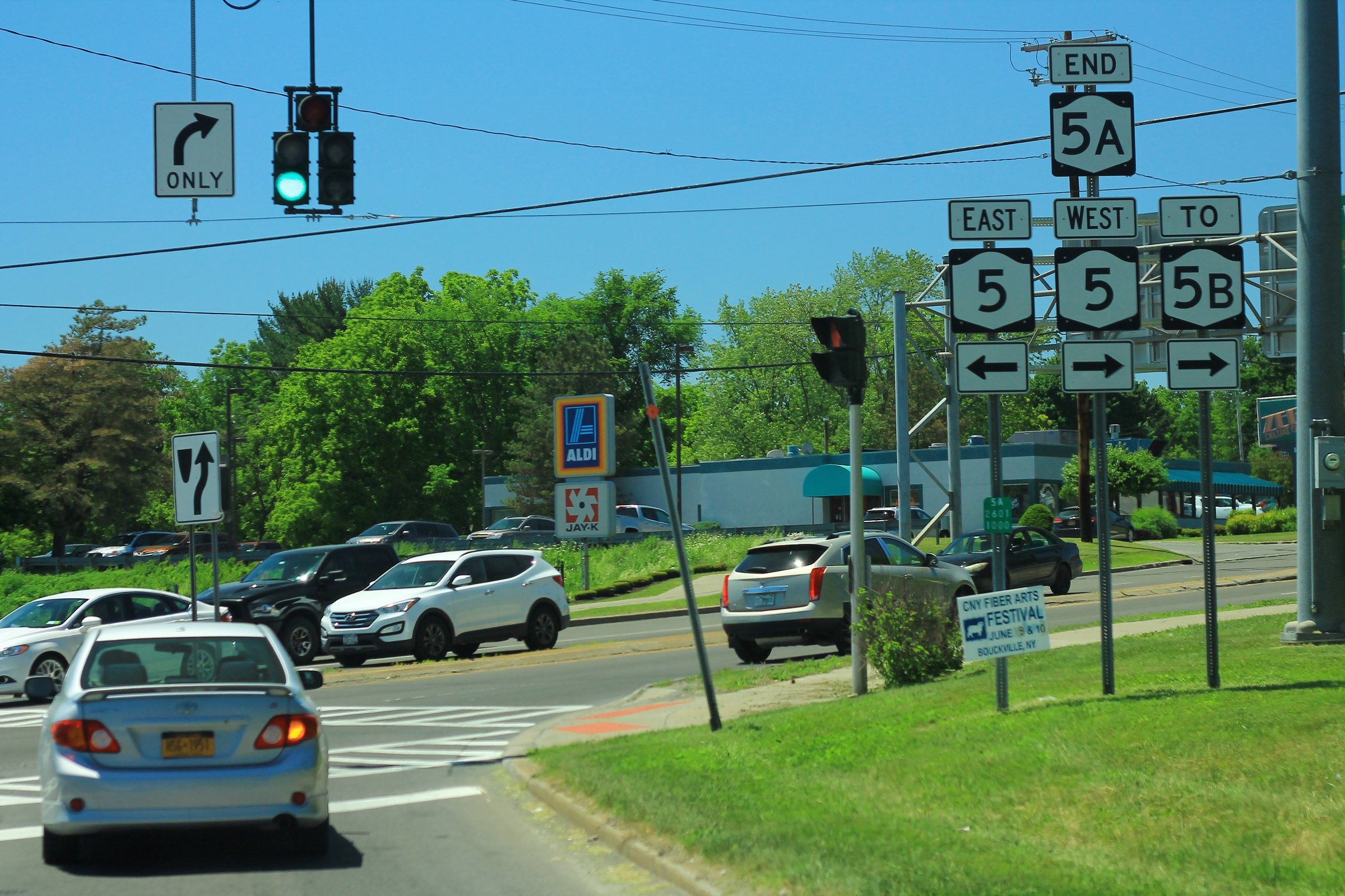 NY5A West End - NY5 NY5B Signs